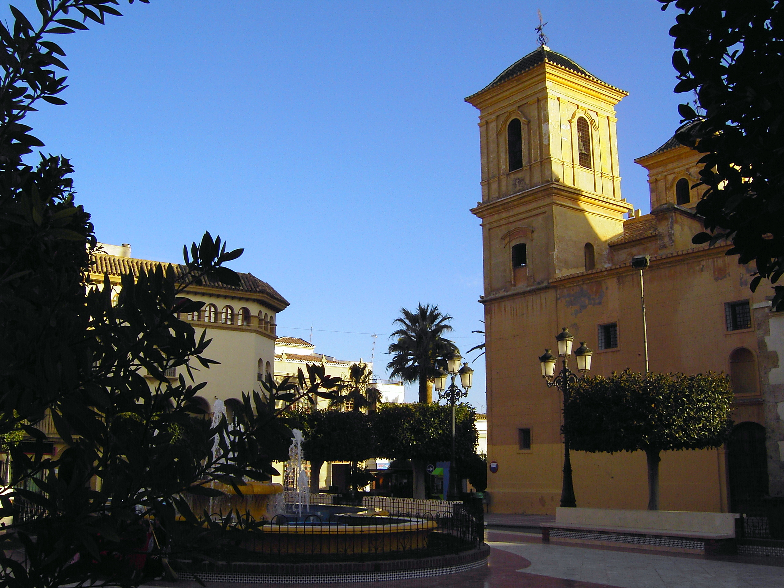 Huércal-Overa (Almería, España)